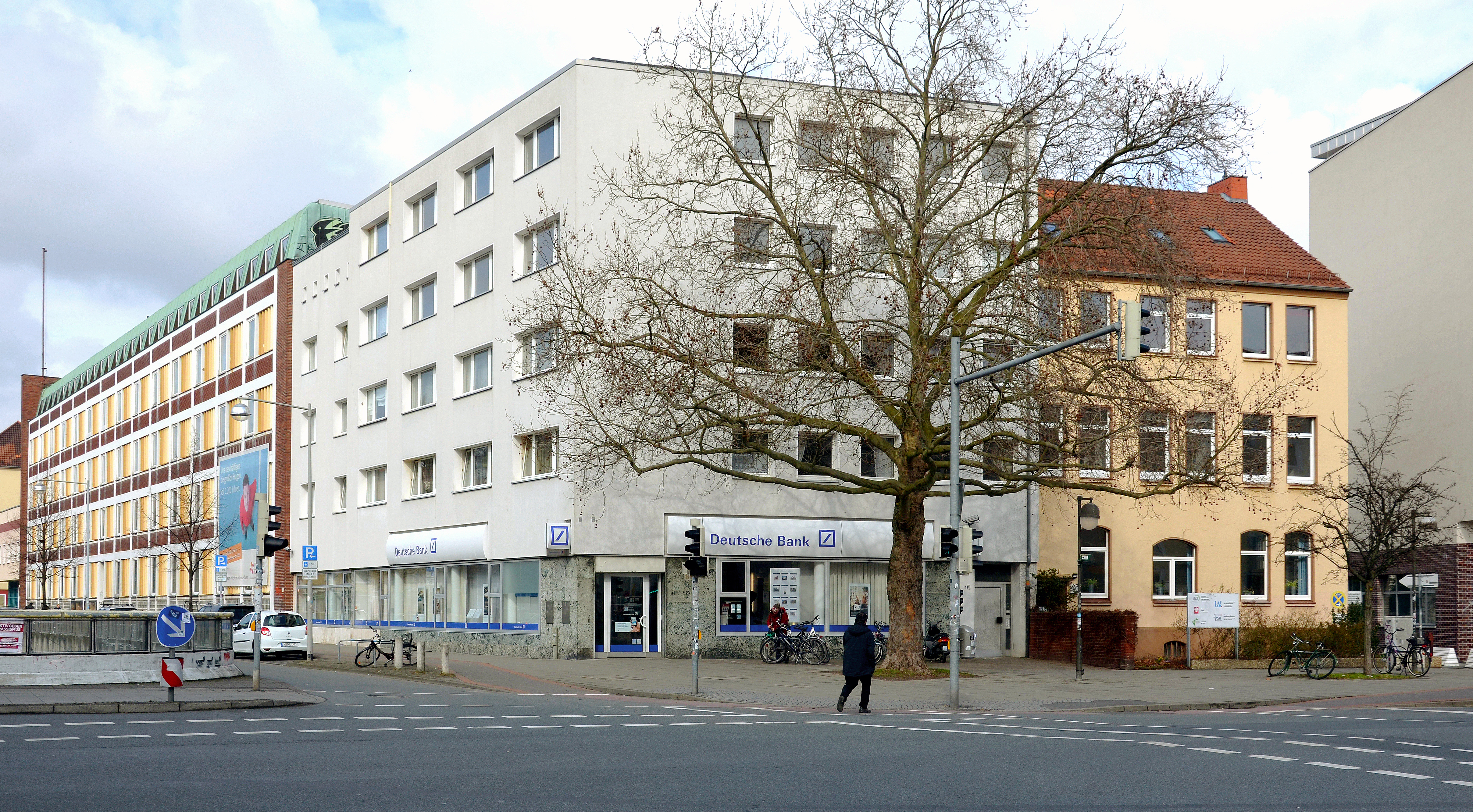 Am Standort des ehemaligen Berliner Warenhaus Gebrüder Wolff, ehemalige Adresse Engelbosteler Damm 38 Ecke Sandstraße in der Nordstadt von Hannover wurde nach dem Zweiten Weltkrieg und den Zerstörungen durch die Luftangriffe auf Hannover ein neues Gebäude errichtet unter der Adresse Kopernikusstraße 1 und 1A, in dessen Erdgeschoss dann eine Filiale der Deutschen Bank eingerichtet wurde.